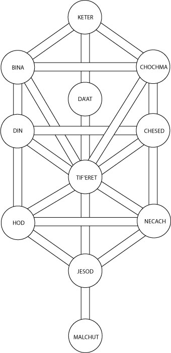 Sefiroticky strom